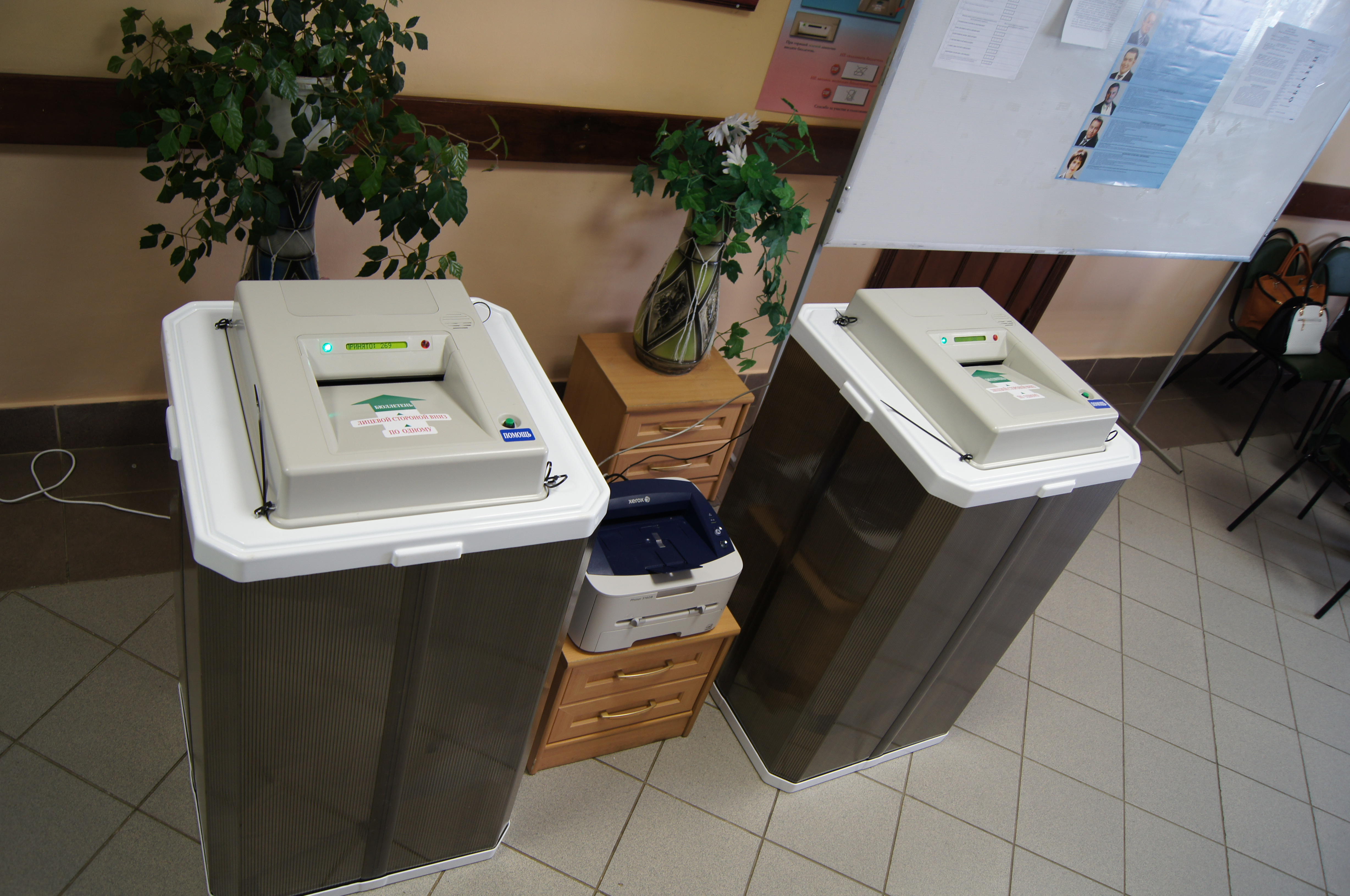 Общий вид комплекса обработки избирательных бюллетеней